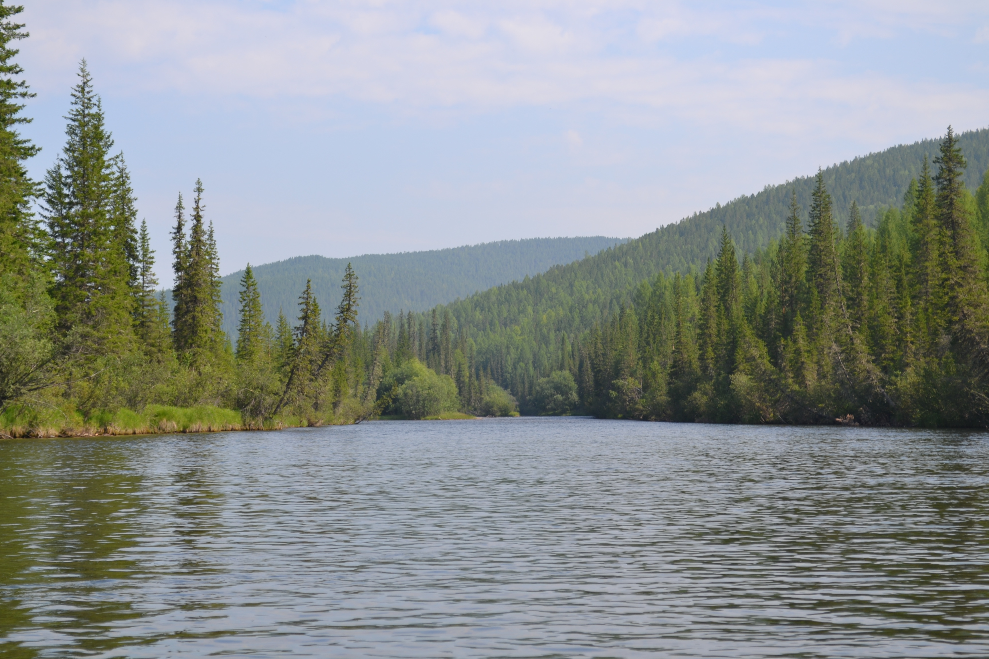 Байкало-Ленский заповедник, Качугский район This image is related to the protected area of Russia number 3800183